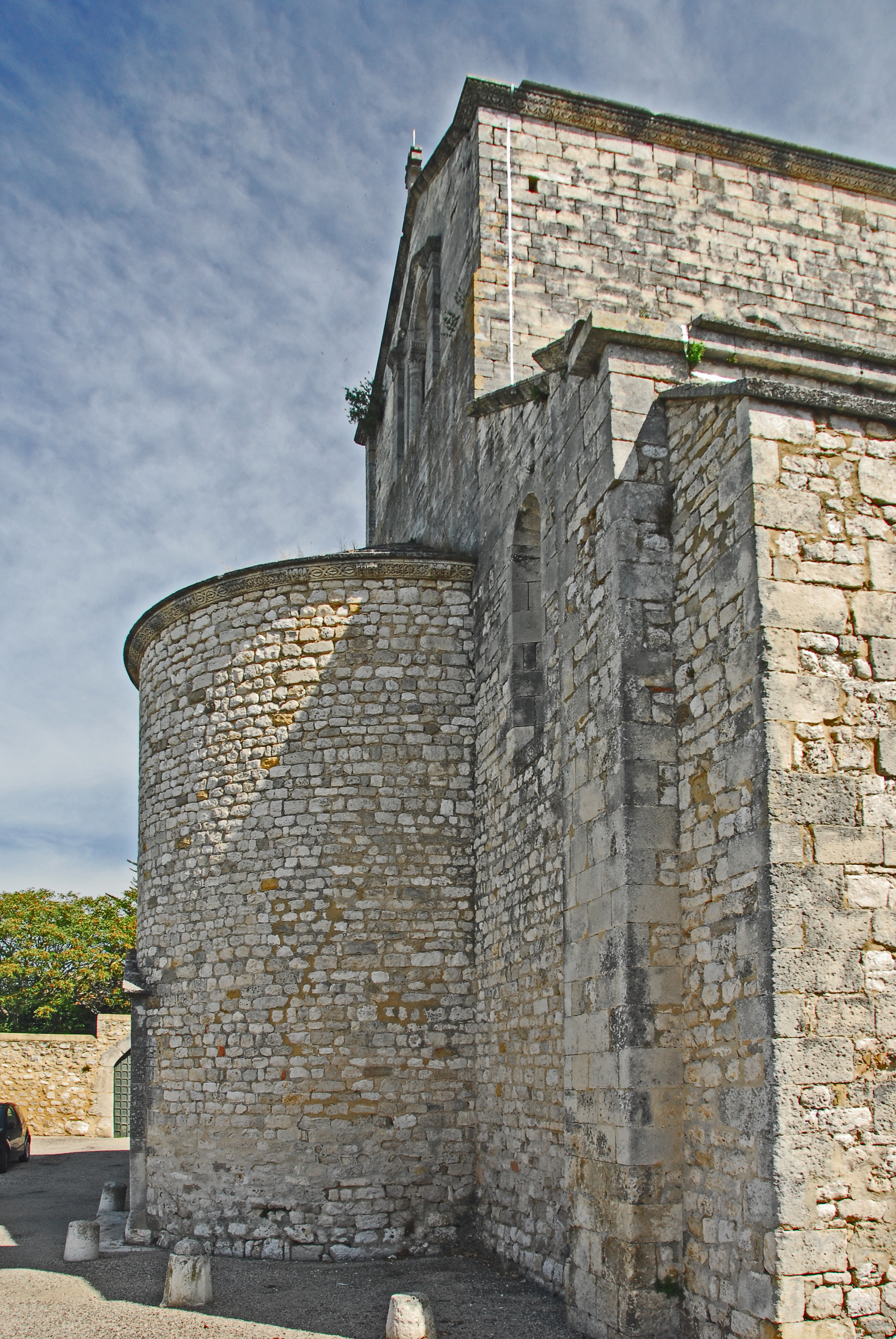 St-Michel de La Garde- Adhémar. Fassade mit Westapsis